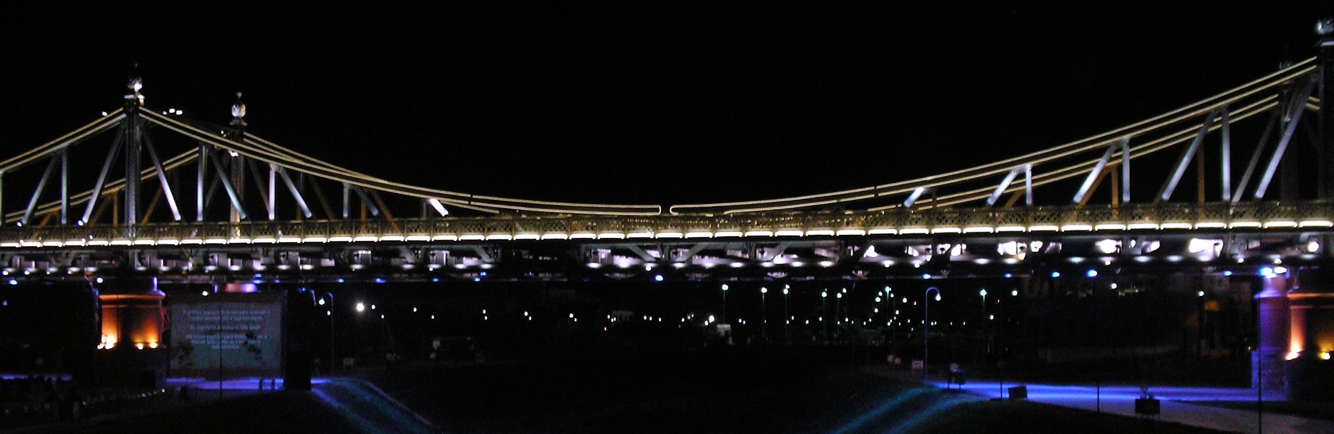 Ponte de Ferro Benjamin Constant, em Manaus, Amazonas.